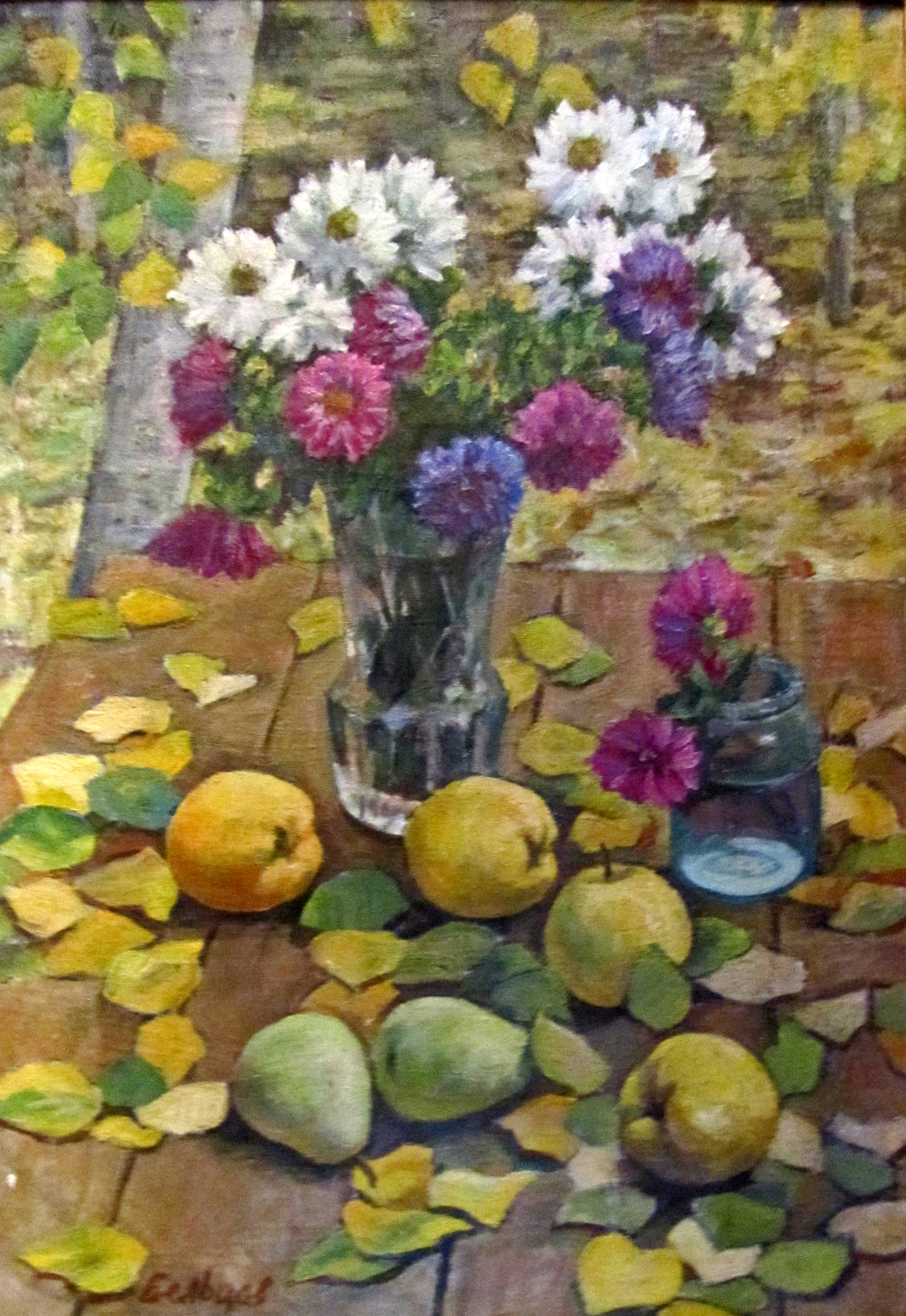 Натюрморт українського художника Г.І. Бельцова "Натюрморт в саду". Створено у 80-х роках в Веселинове, Україна.